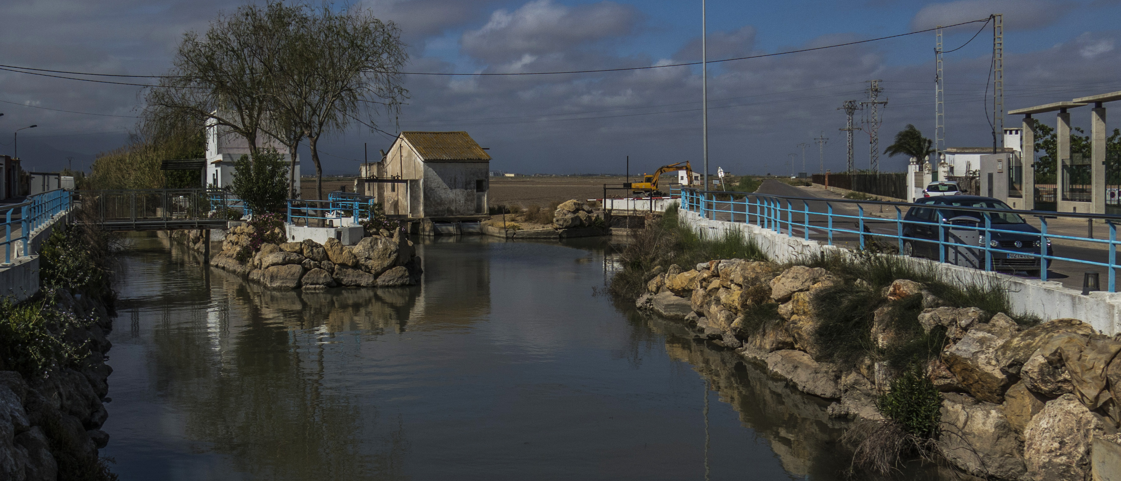 Mareny de Barraquetes és una localitat del País Valencià, antiga pedania del municipi de Sueca i des del 12 de desembre de 1999, definida com a entitat d'àmbit territorial inferior al municipi, EATIM. Es troba enclavat en el Parc Natural de l'Albufera de València i al costat de la mar